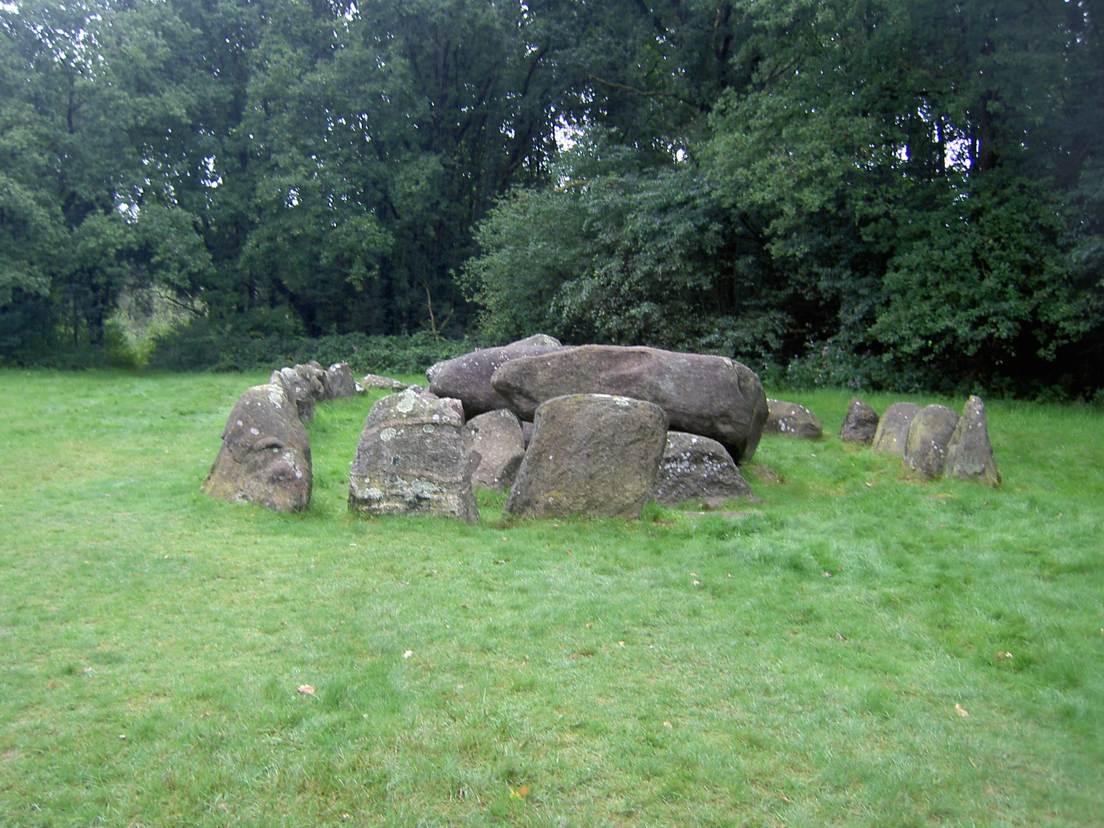 Hunebed D20 in Drouwen